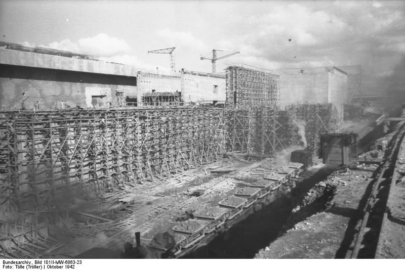 Scherl: An der Atlantikküste: Arbeitssymphonie am Atlantik. -Vor den U-Boot-Boxen wird ein neues Hafenbecken ausgeschachtet. Kleine Kipploren schaffen die Erde fort. MPK-Aufnahme: Kriegsberichter Tölle, Oktober 1942, Archiv-Notiz: La Pallice, 6495-42